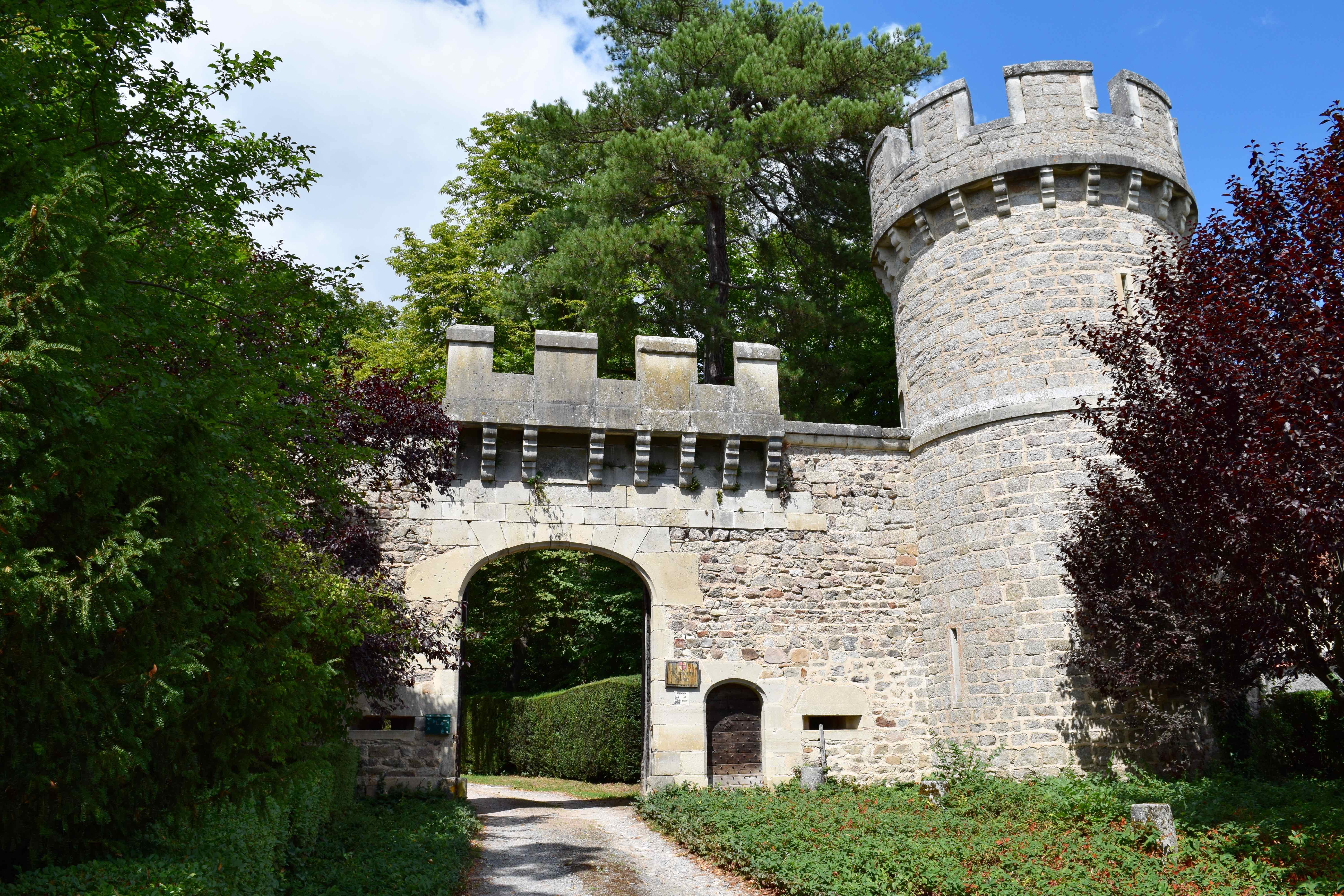 Château de Jozerand .